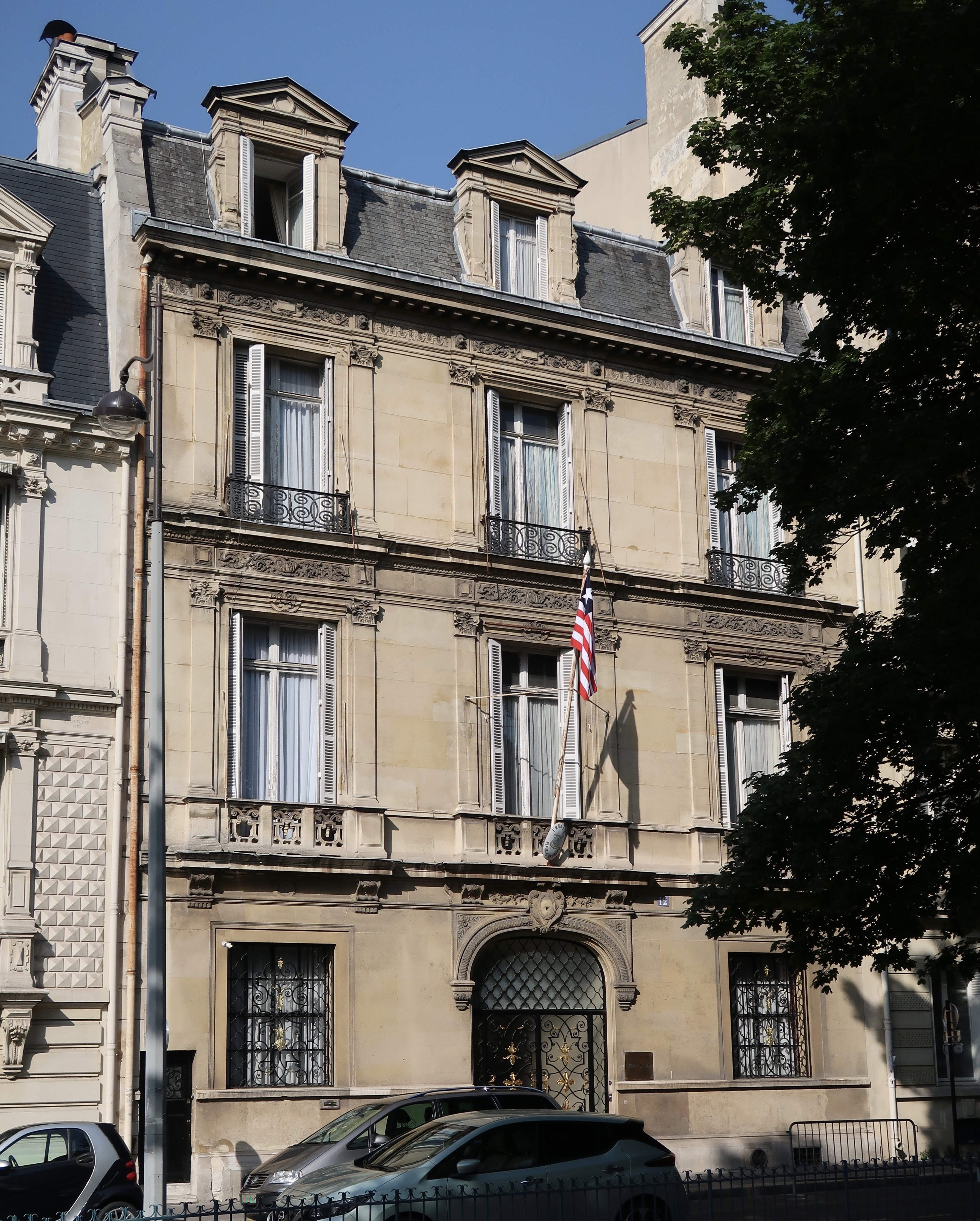 Ambassade du Liberia en France, 12 place du Général-Catroux (Paris, 17e).